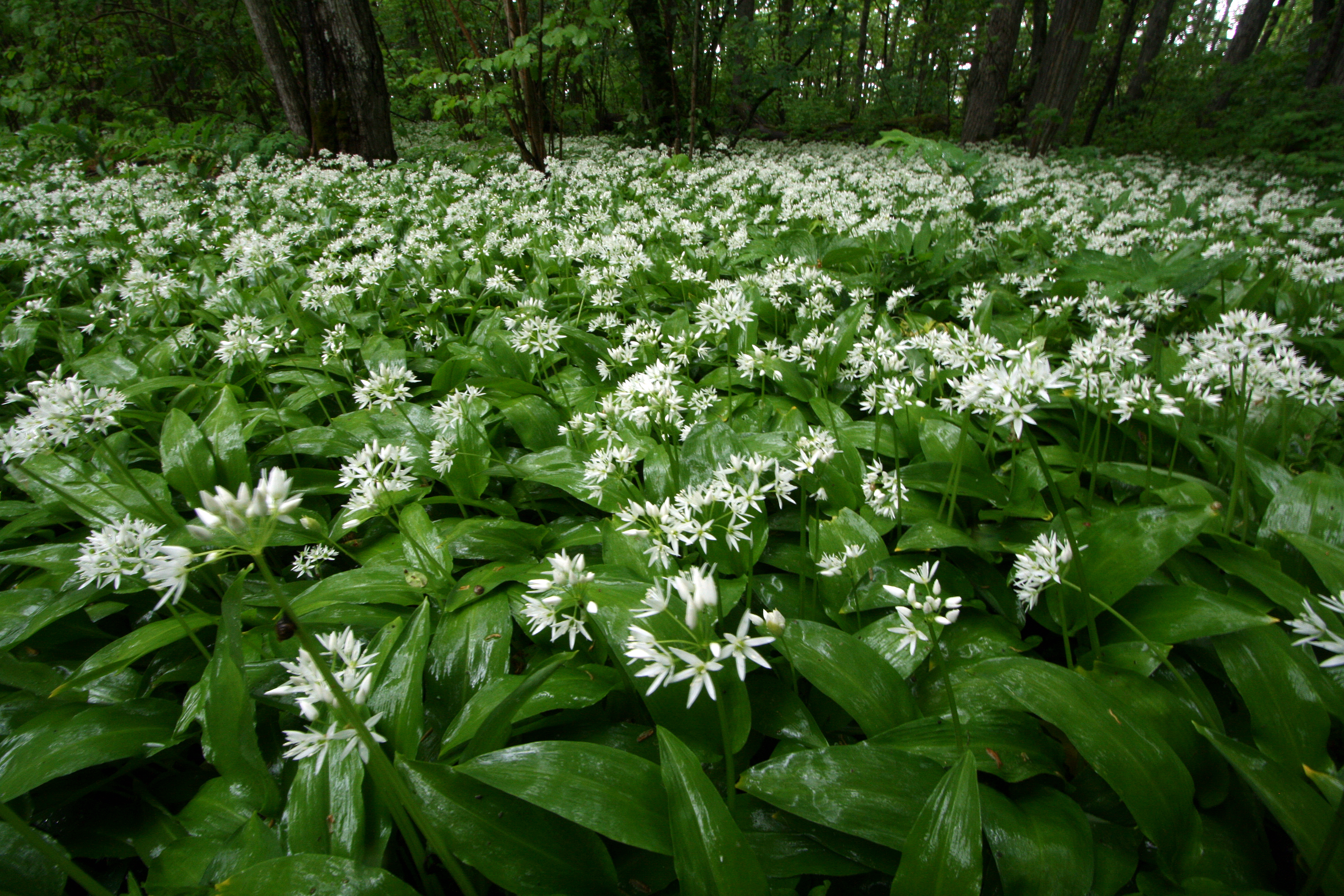 Puhtulaiu üks tuntumaid vaatemänge - õitsev karulauk (Allium ursinum). Hunnitu vaatepilt ja hurmav ning isuäratav lõhn, mis selle vaatepildiga kaasneb.